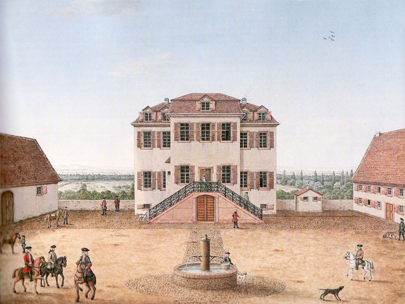 in Darmstadt, Sitz des Jazzinstitutes